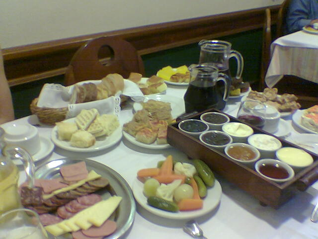 Café Colonial Bela Vista, em Gramado - RS. Isso é só a metade do que serviram. Logo depois trouxeram salame, frango e porco grelhados, linguiça, frango à milanesa, polenta frita, steak de frango, risoles, pastel de chocolate, bolinha de queijo... e você ainda poderia pedir chás, café e chocolate quente. Além de uma geladeira repleta de sobremesas como torta mousse de limão, mousse de chocolate, bolos, pavês... UFA!!!